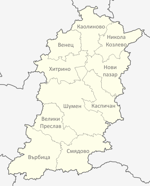 Картата е създадена от Любомир Таушанов